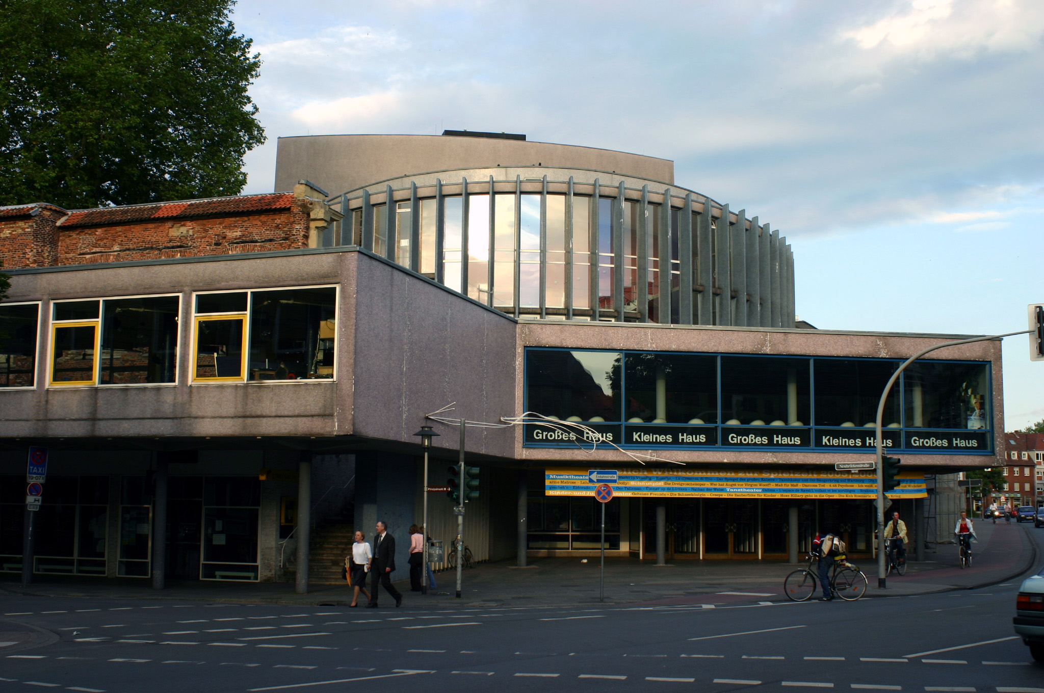 Münster, Stadttheater